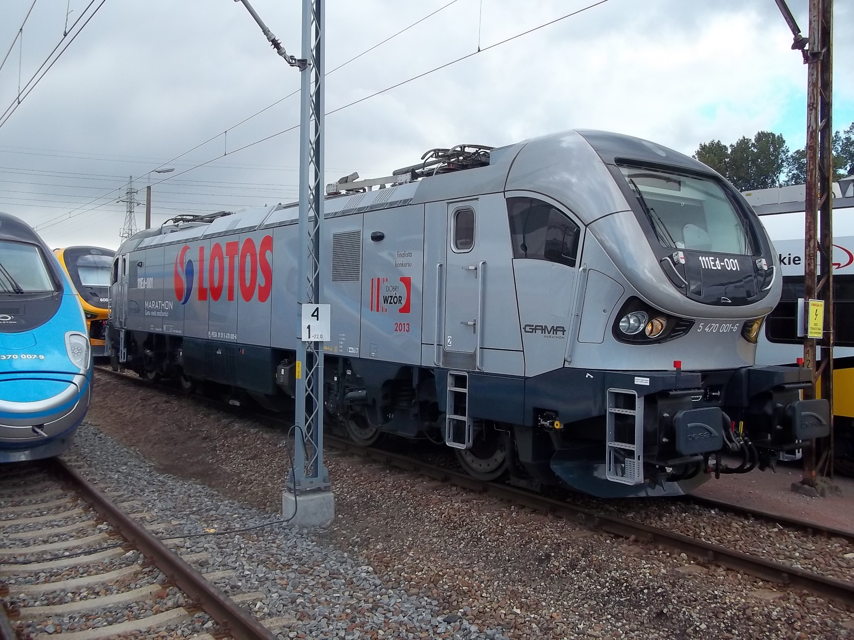 Lokomotywa elektryczna 4-osiowa o mocy 5600 kW, zasilana napięciem 3 kV DC, o oznaczeniu 111Ed "Gama", wyprodukowana przez PESA Bydgoszcz S.A., wyposażona w dodatkowy spalinowy system dojazdowy "Marathon", umożliwiający wykonywanie prac manewrowych na odcinkach niezelektryfikowanych.